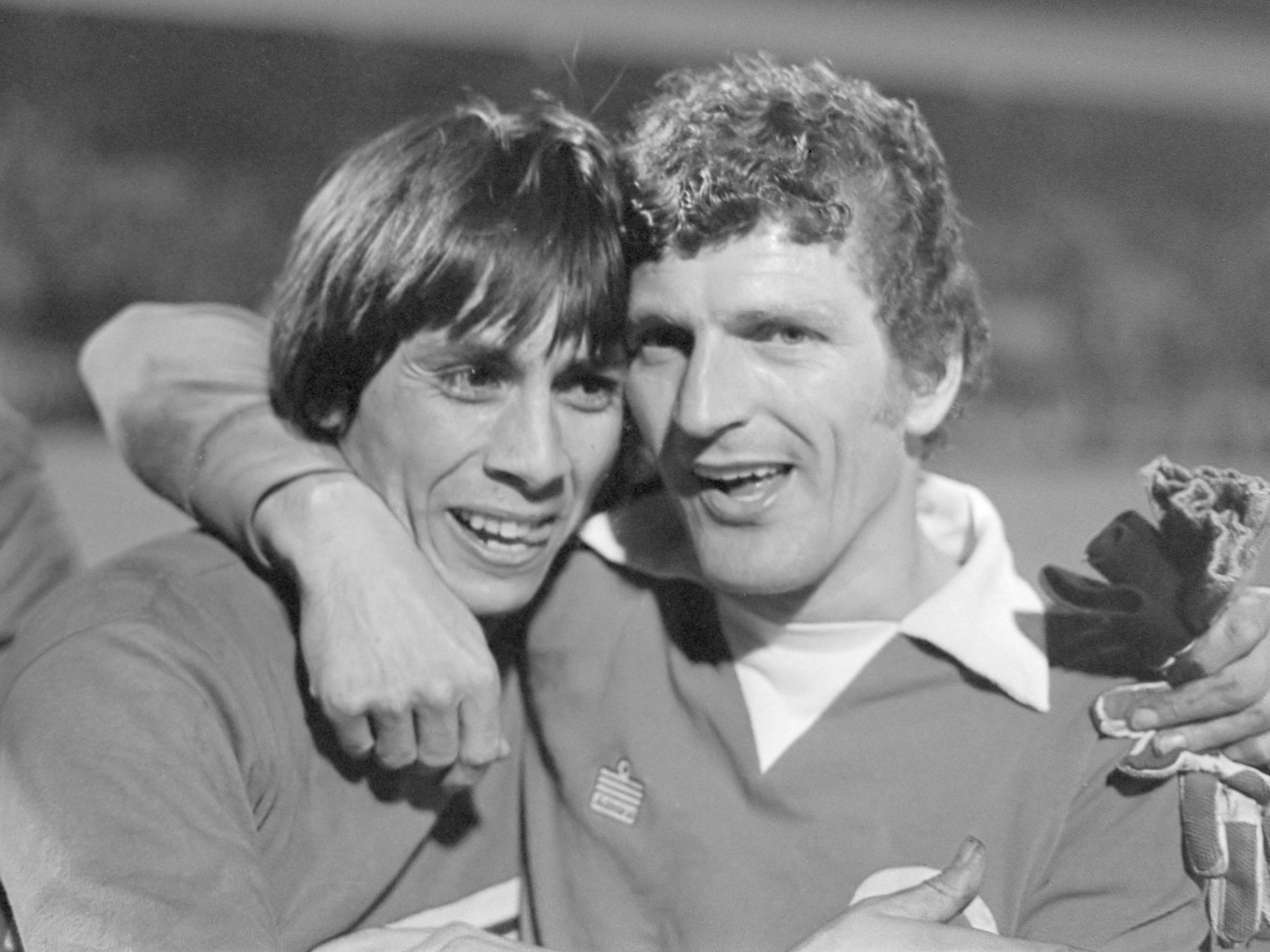 PSV tegen De Graafschap 0-0; keeper Doornebosch (links) verlaat gelukkig het veld, rechts Overgoor 10 april 1976